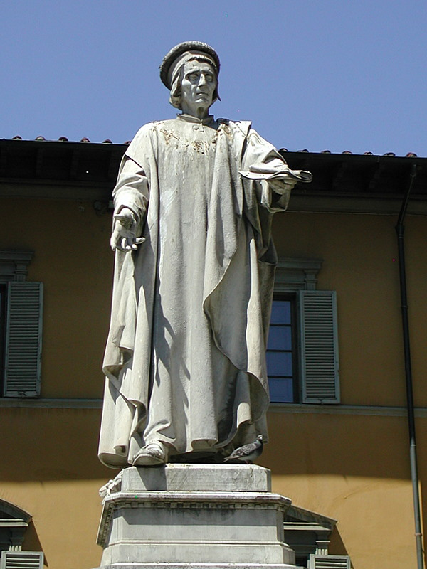 Francesco di Marco Datini (Piazza del Comune, Prato)